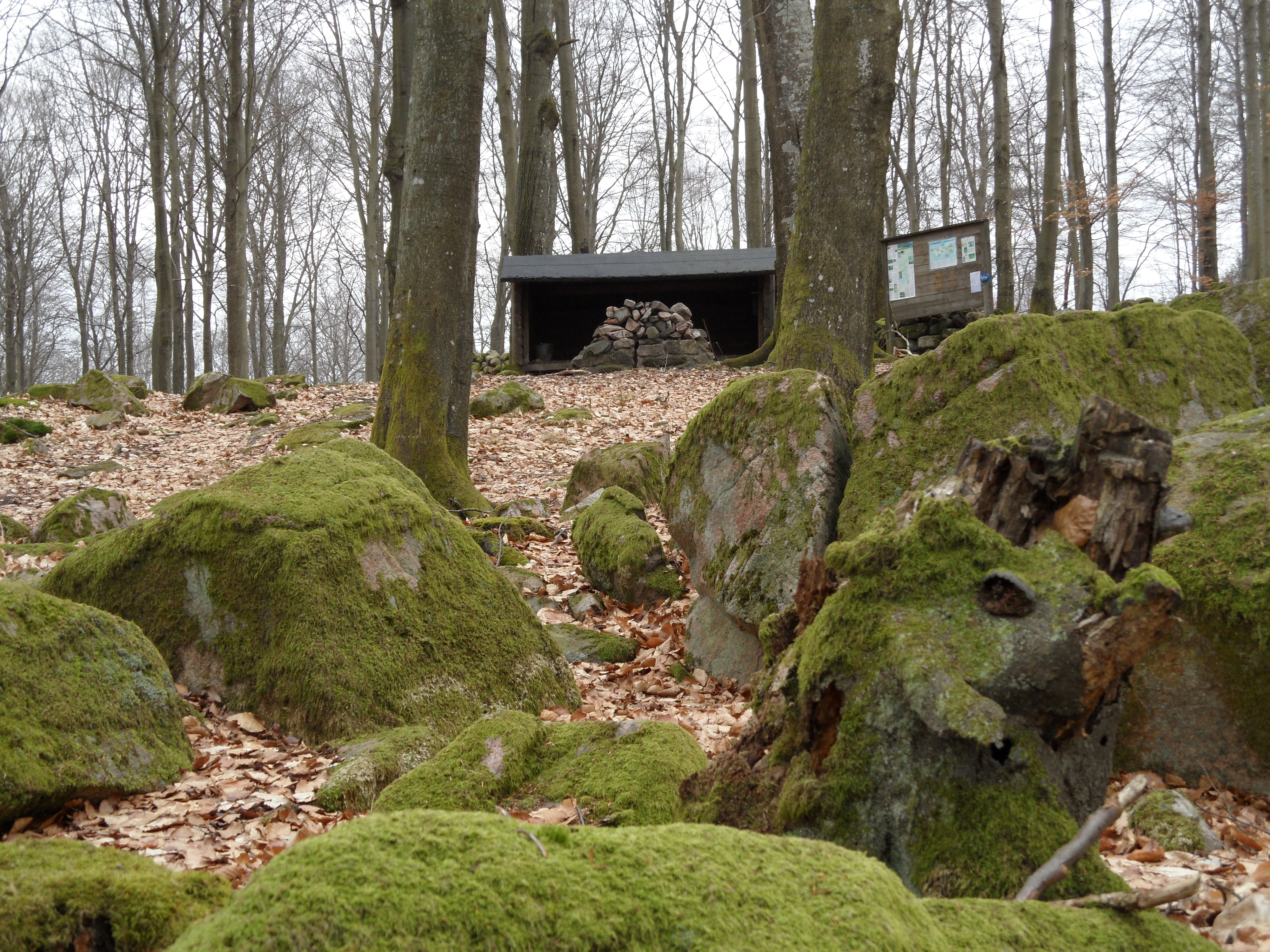 Skåneledens vindskydd i naturreservatet Södra Hultarp, vårvinter